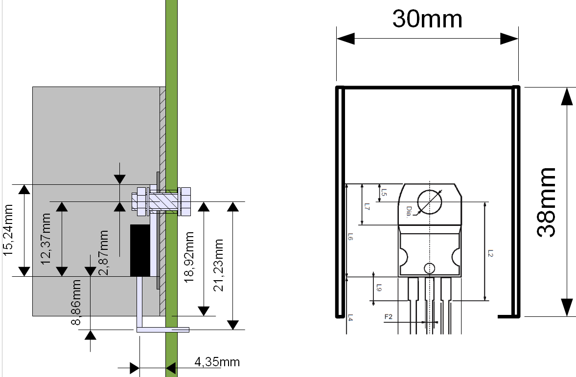 Valerio Messina, cad draw shot of T0-220 on sink